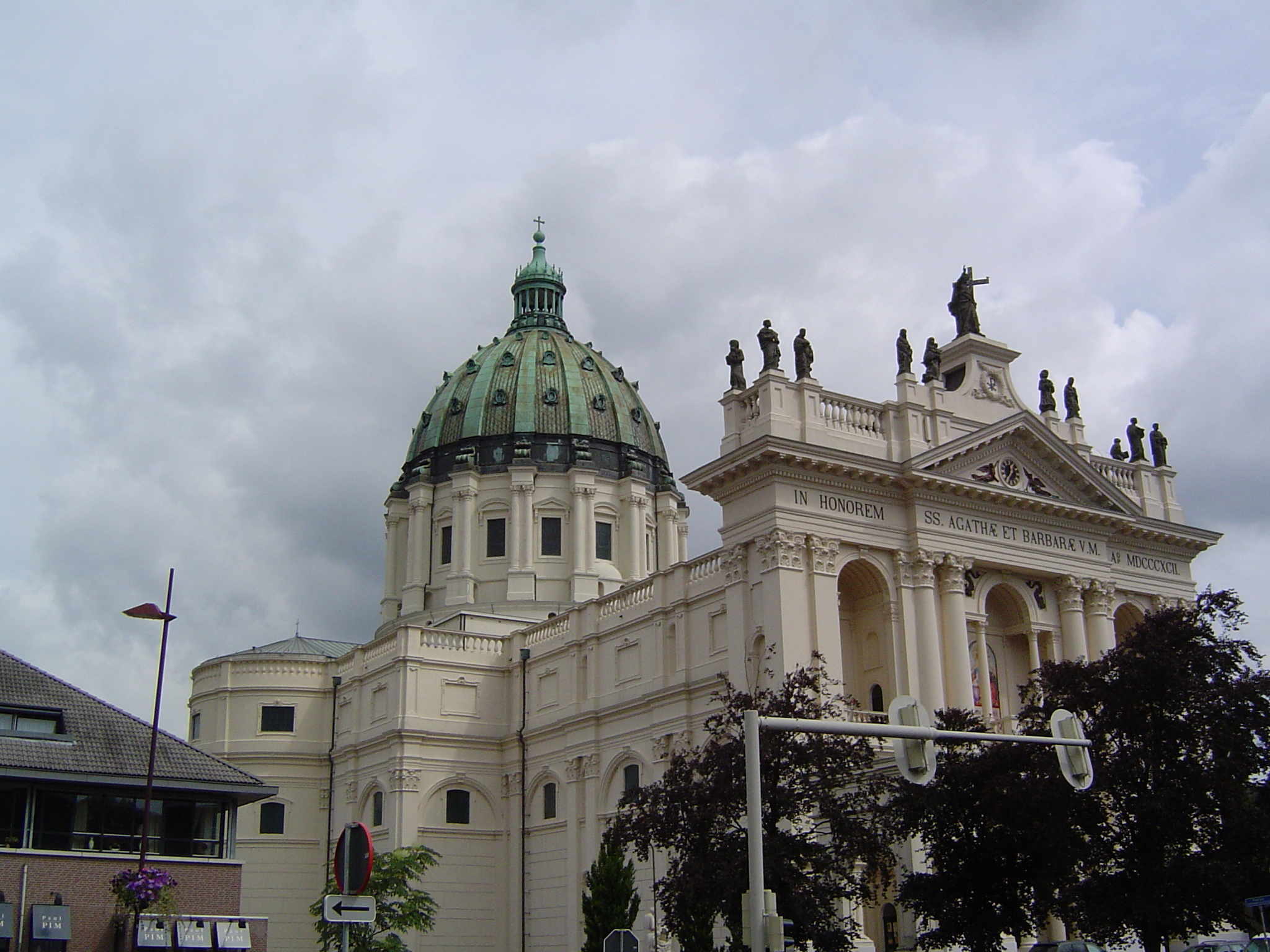 Oudenbosch Basilica, Holland